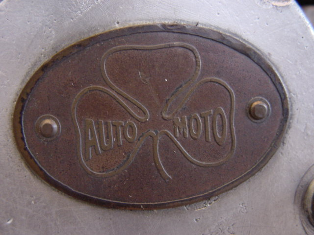 Automoto logo.